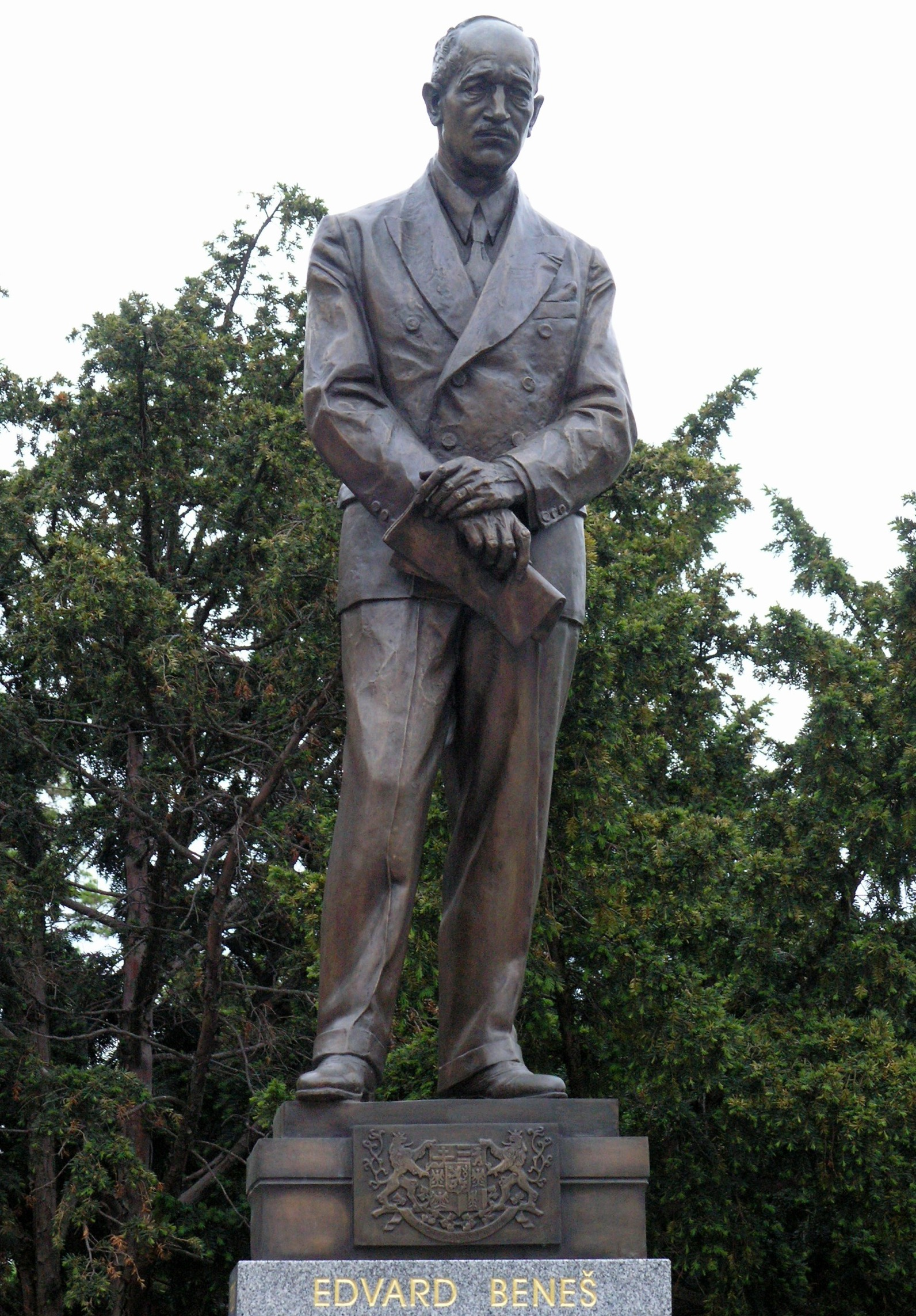 Edvard Beneš - socha na Loretánském náměstí